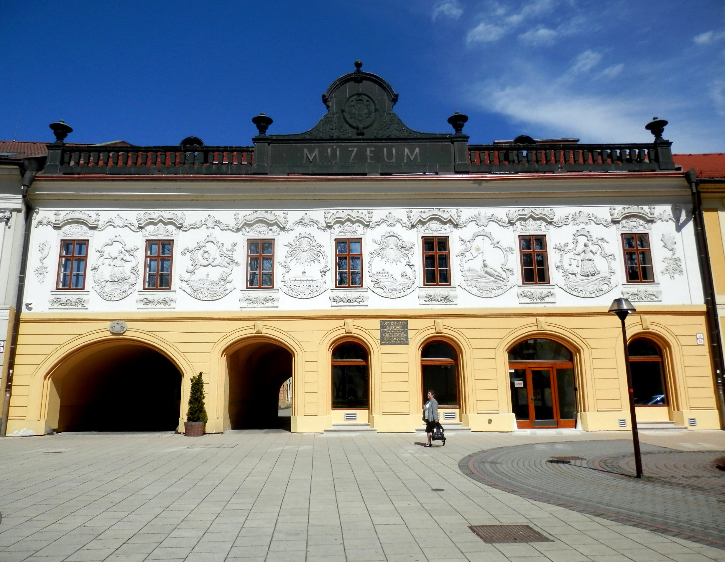 Rokoková budova Župného domu (provinčný dom) bola postavená v 13. storočí. Od roku 1954 má v ňom svoje expozície Múzeum Spiša. Budova je vedená v zozname národných kultúrnych pamiatok SR. Ulica Letná číslo 50. Mesto Spišská Nová Ves.